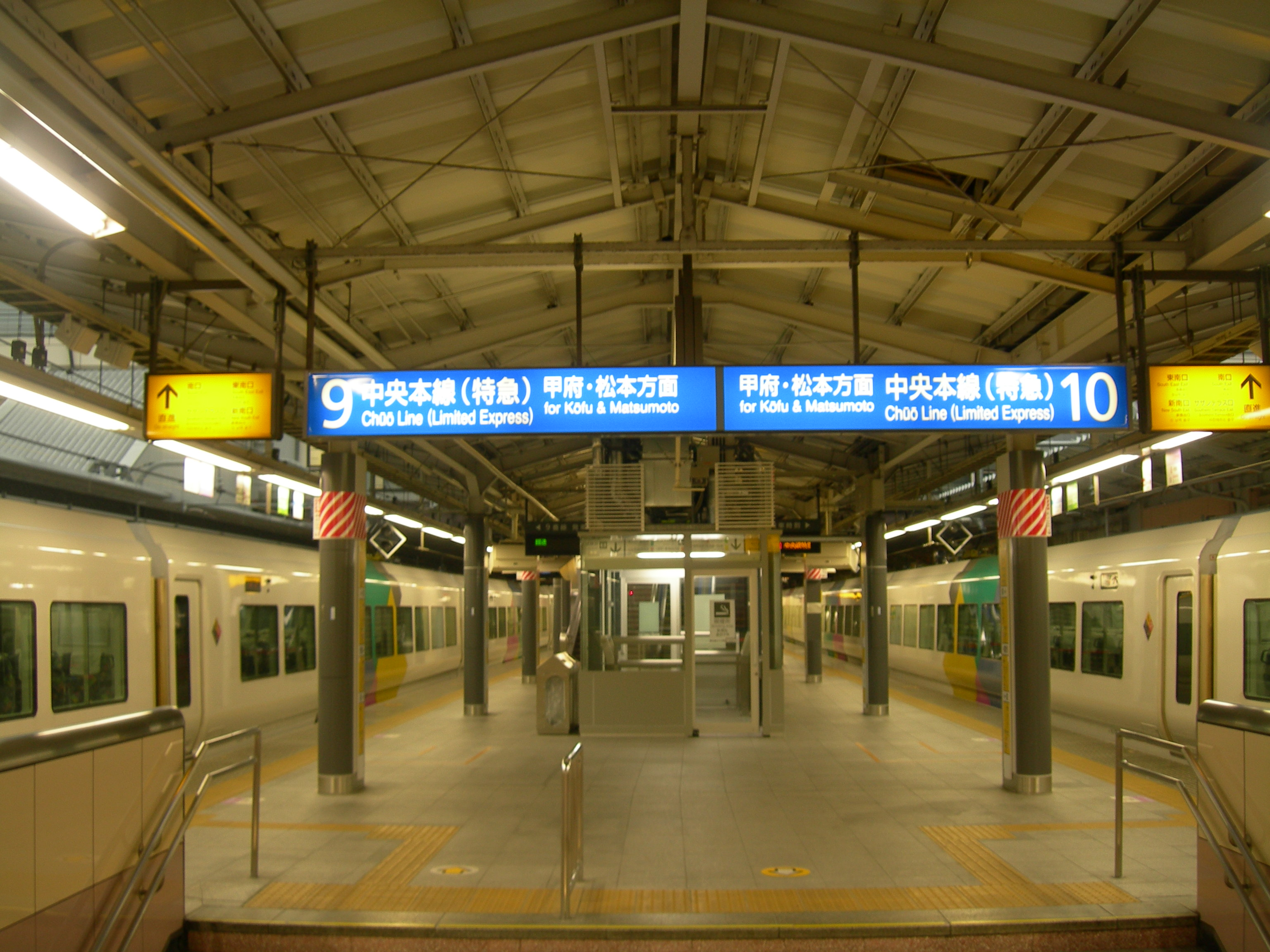 JR新宿駅中央線特急ホーム [1]